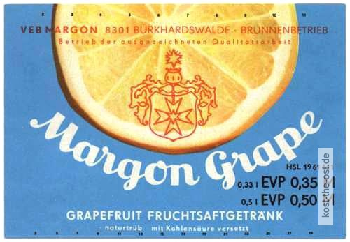 Margon stara etykieta